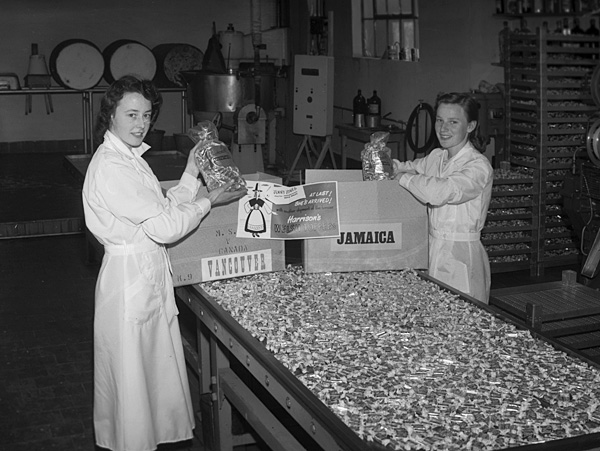 Teitl Cymraeg/Welsh title: Ffatri Taffi Harrison ym Mhenrhyndeudraeth Ffotograffydd/Photographer: Geoff Charles (1909-2002) Dyddiad/Date: 1/7/1959 Cyfrwng/Medium: Negydd ffilm / Film negative Cyfeiriad/Reference: (gch20574) Rhif cofnod / Record no.: 3470311 Rhagor o wybodaeth am gasgliad Geoff Charles yn Llyfrgell Genedlaethol Cymru More information about the Geoff Charles Collection at the National Library of Wales Mae ffotograffau Geoff Charles hefyd yn rhan o Broject Europeana Libraries Geoff Charles' photographs also form part of the Europeana Libraries Project